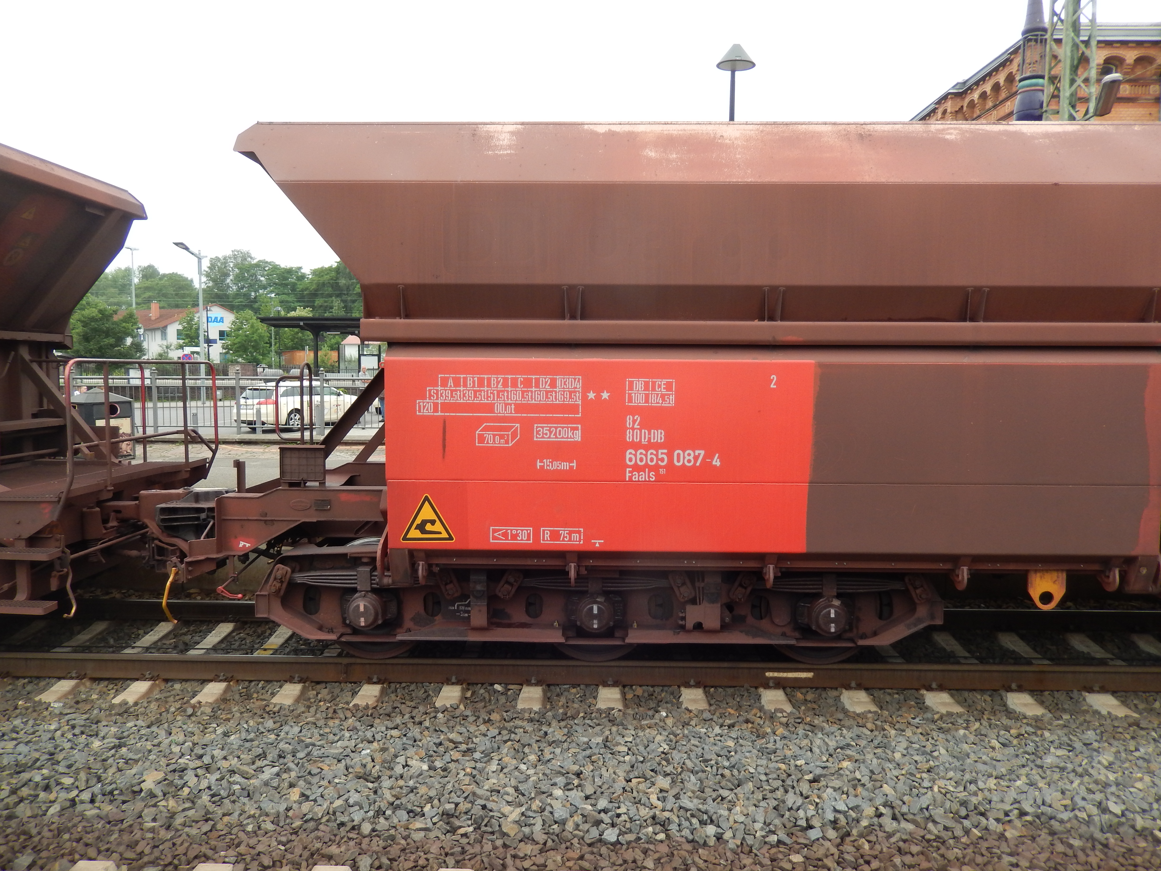 Erzwagen Faals der Deutsche Bahn Cargo Aktiengesellschaft im Hundertwasserbahnhof Uelzen.